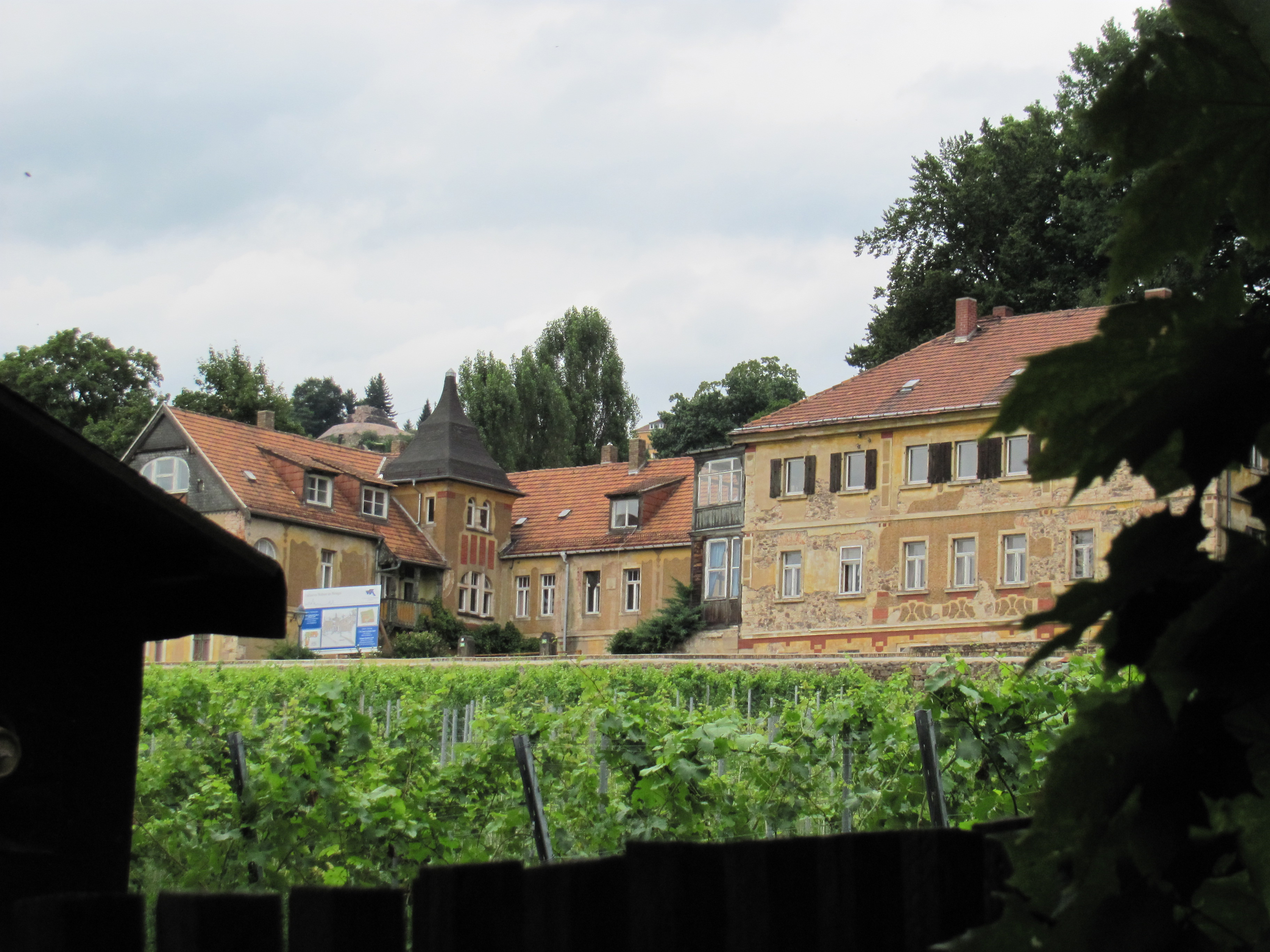 Radebeul-Oberlößnitz, Weingut Hofmannsberg